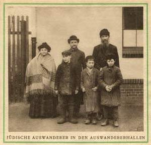 Famille Ashkénaze d'Europe centrale (frontière allemano-polonaise) XIXe Siècle. Ancienne photo ne faisant pas objet d'un droit à l'image ou de la necessité de la demande d'exploitation. Scanné carte. photo présente sur Wikipedia : Ashkénaze